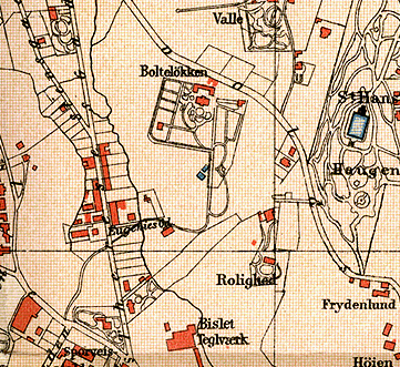 Kart over Bolteløkka, 1887